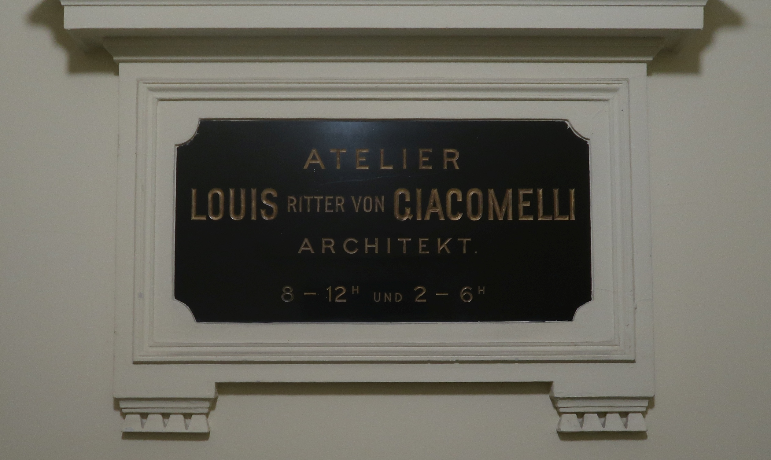 In der Sechskrügelgasse hatte der Architekt Louis (Luigi) Giacomelli ab ungefähr 1900 bis zu seinem Tod 1918 das Atlier und die Wohnung